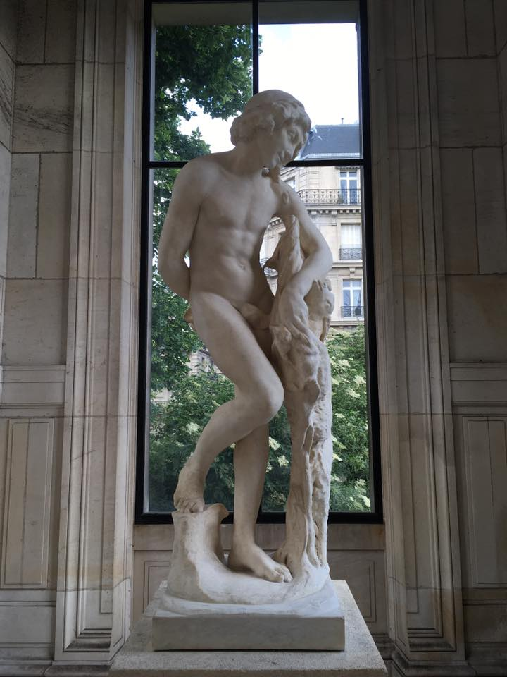 Alexandre Pezieux, Jeune berger, 1894, marbre, Paris, Palais Galliera